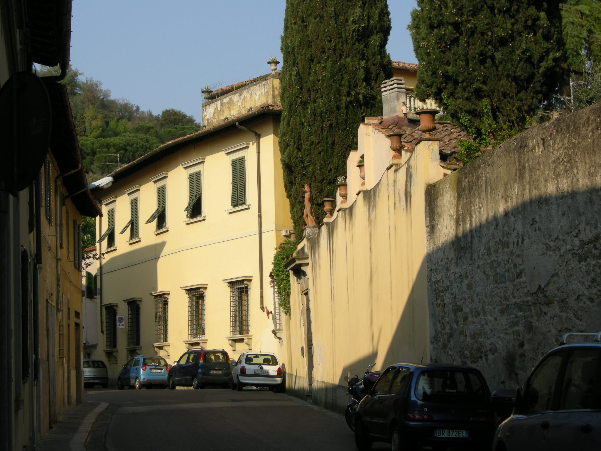 Villa la torretta firenze